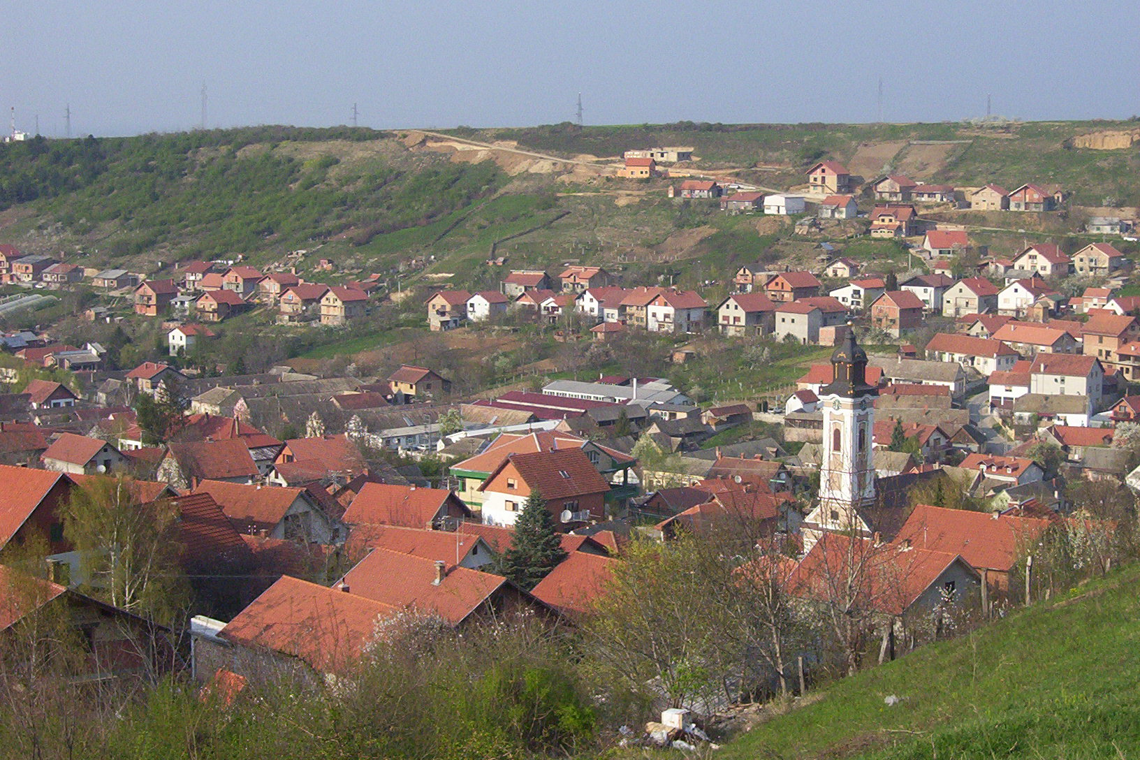 Village of Bukovac, in Vojvodina, Serbia.